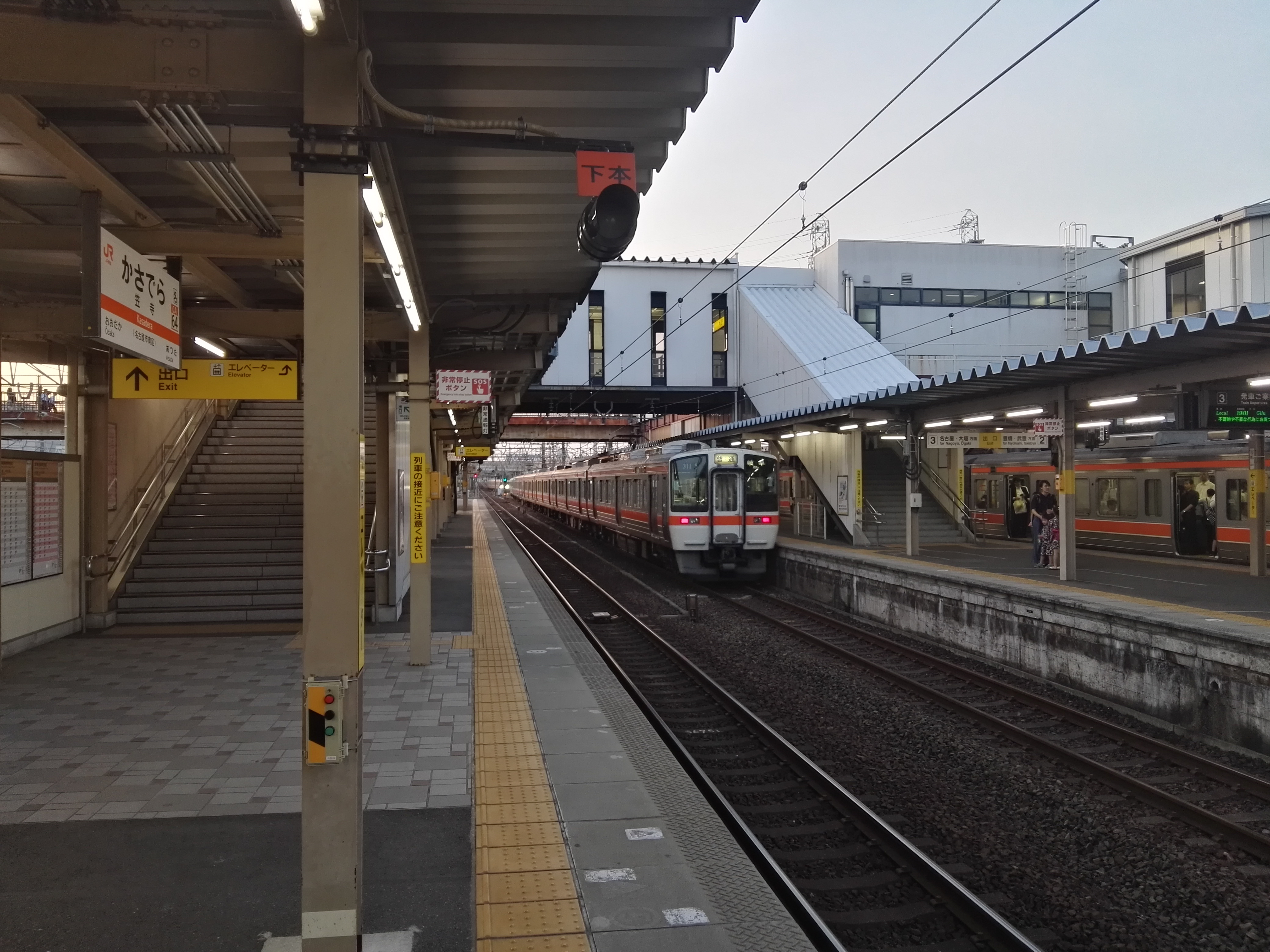 JR Kasadera station platform